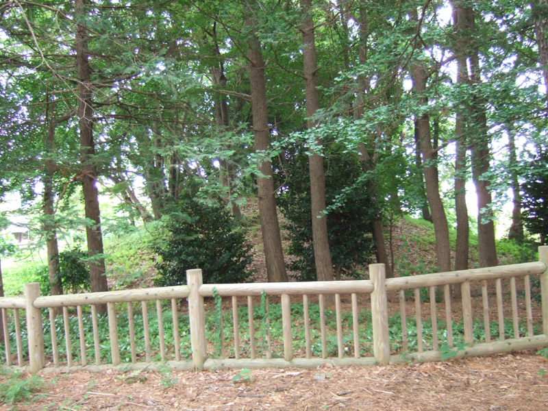 馬絹神社・馬絹古墳